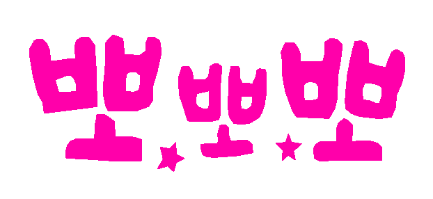 1981년부터 2007년까지 사용했던 뽀뽀뽀 기본 이미지 로고입니다.